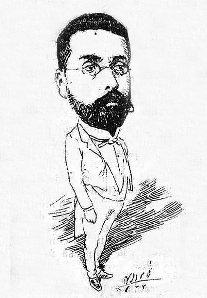 Francisco de Paula Sánchez Gabanyach.